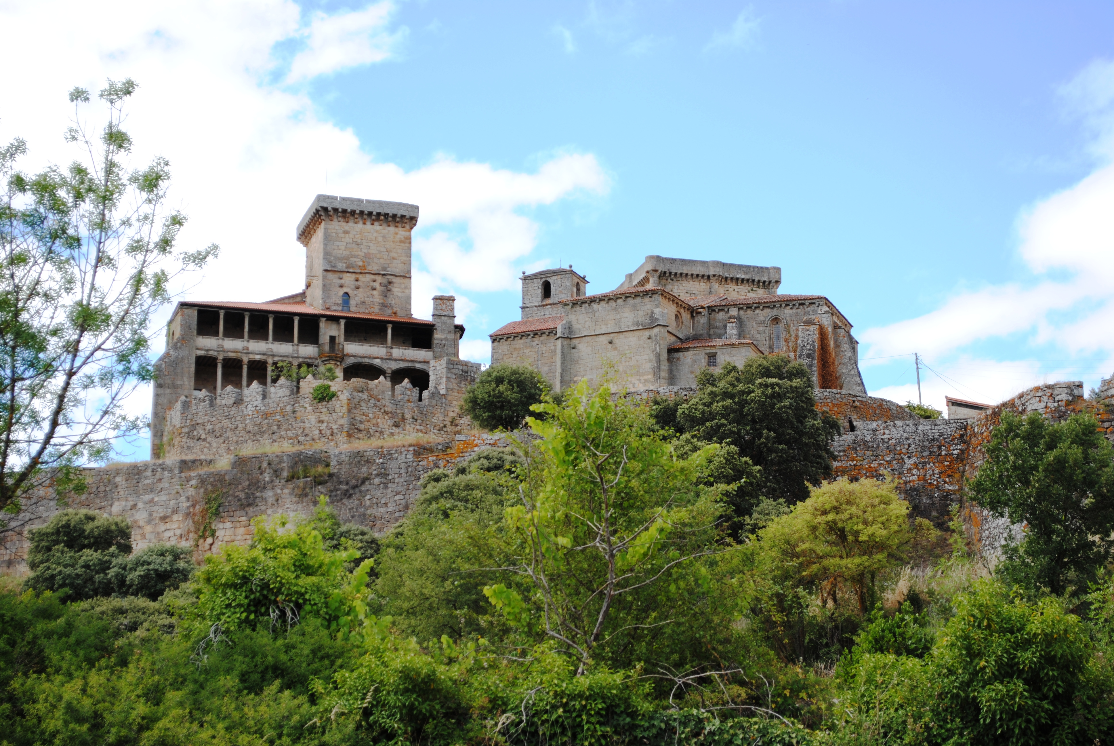 Vexa o título e as categorías.